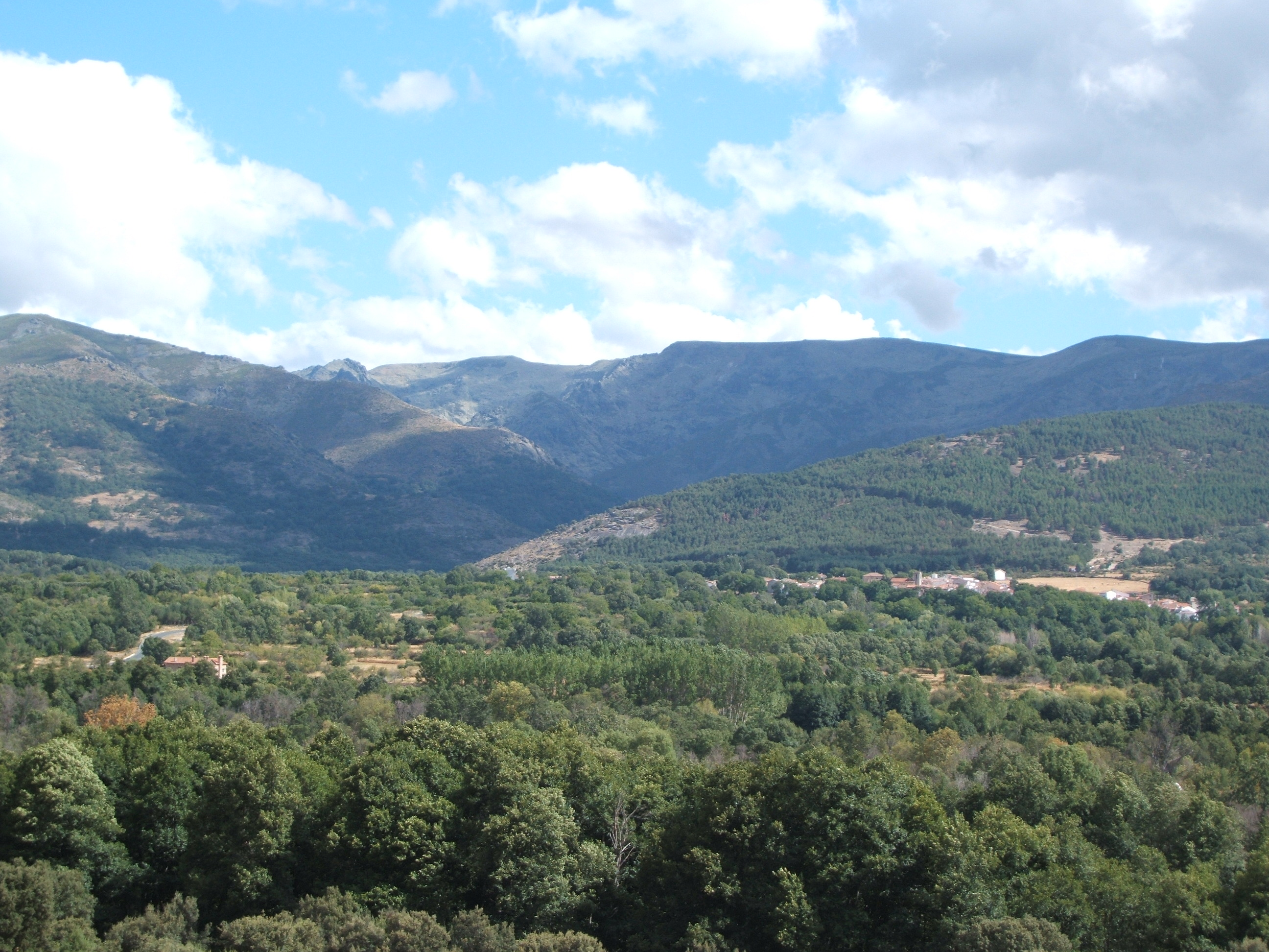 Vista general de Bohoyo (Ávila, España). AUTOR: Alfredo (con permiso del autor)